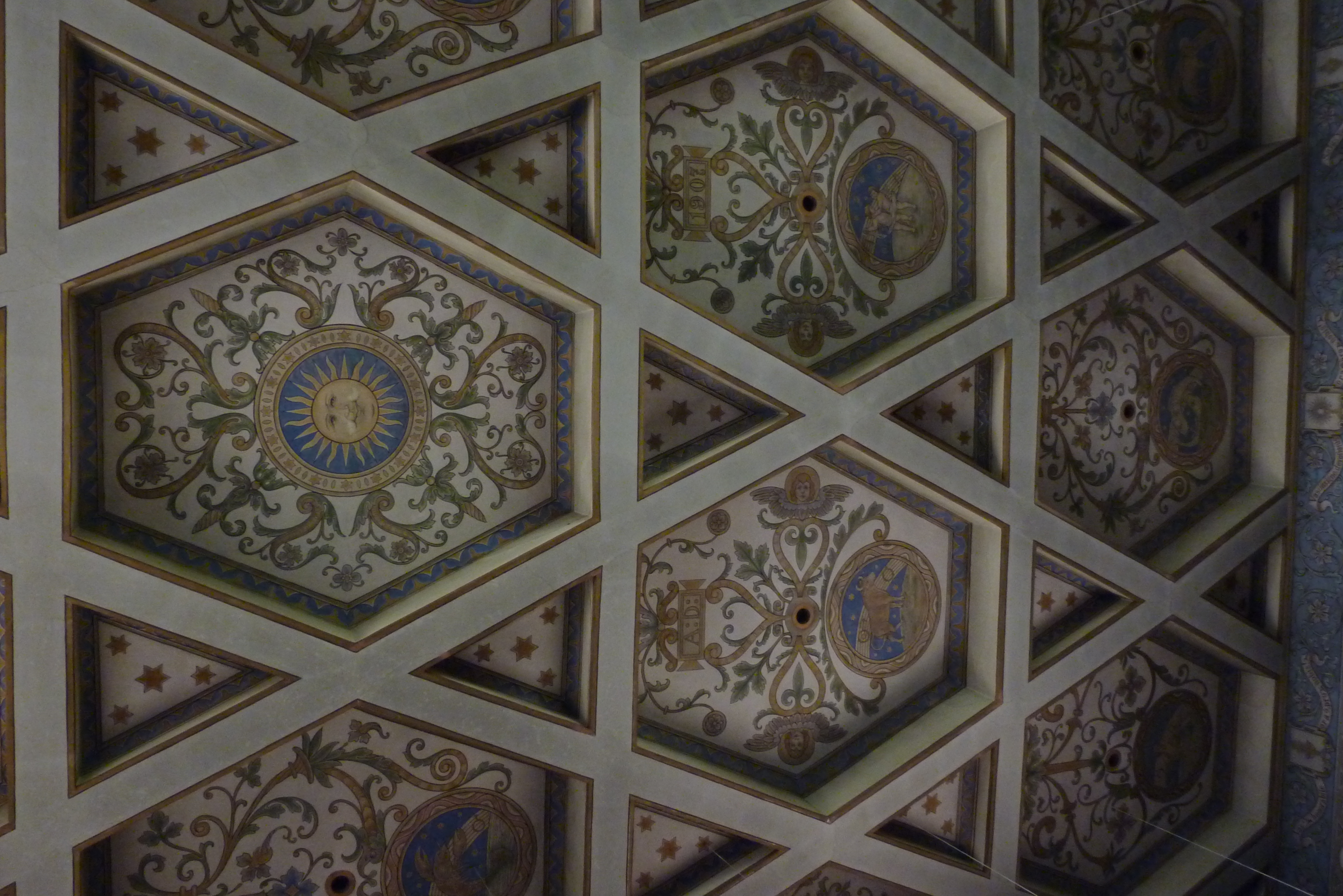 katholische Pfarrkirche St. Lubentius in Kobern-Gondorf, Kassettendecke